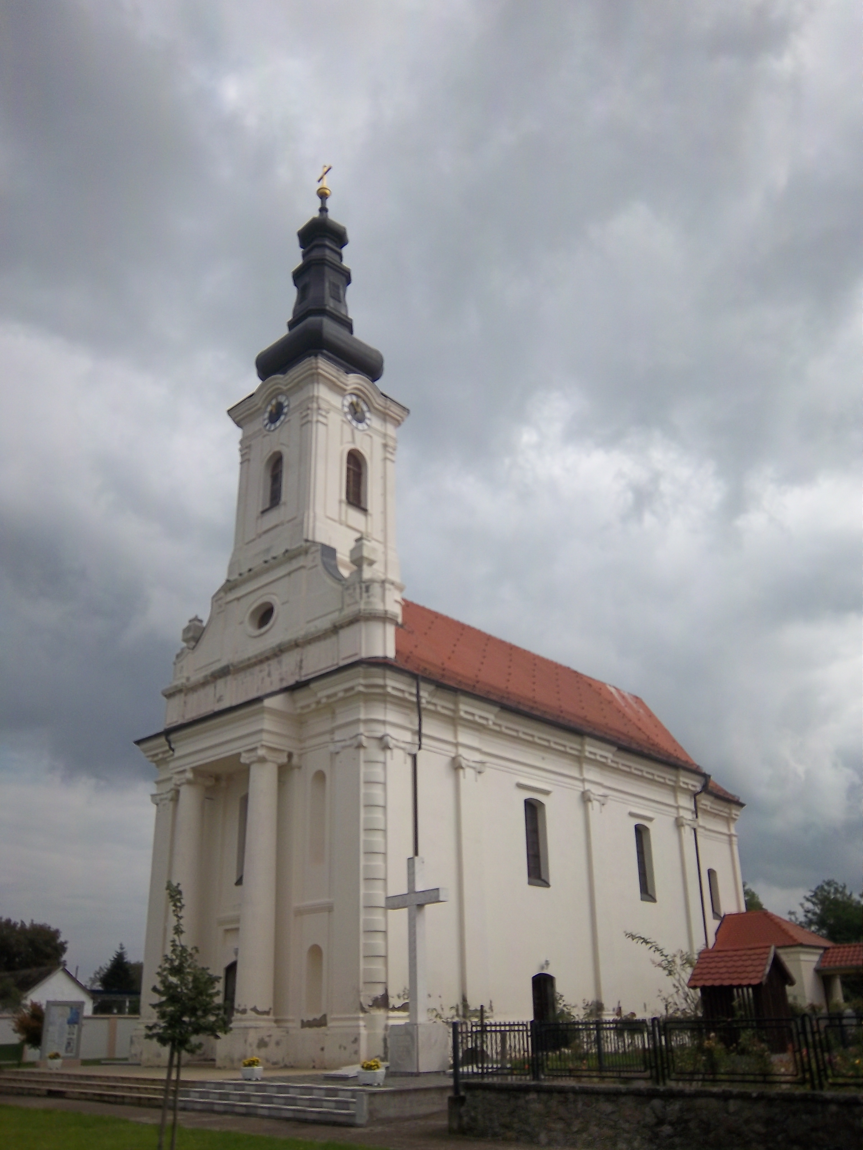 Српски (ћирилица): Римокатоличка црква у Товарнику (Република Хрватска)